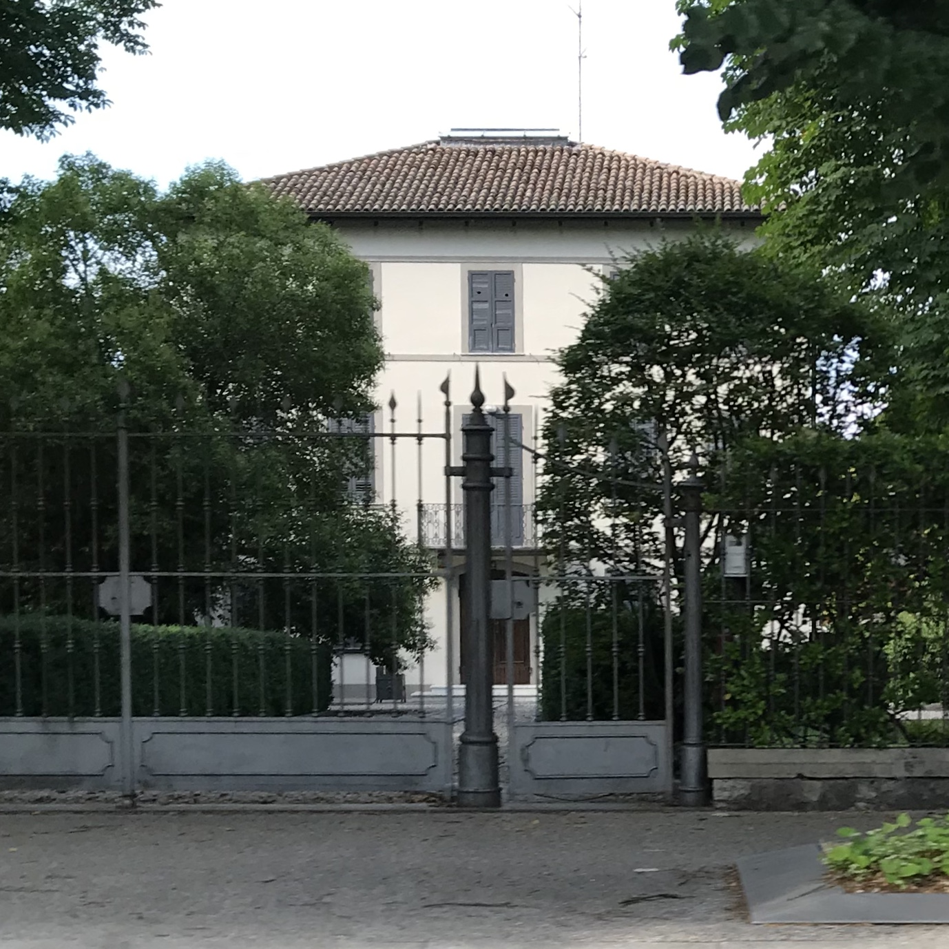 La villa ottocentesca ultima residenza del tenore Ferruccio Tagliavini a villa Ospizio